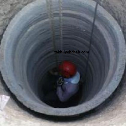 نحوه حفر چاه فاضلاب و اندازه چاه فاضلاب